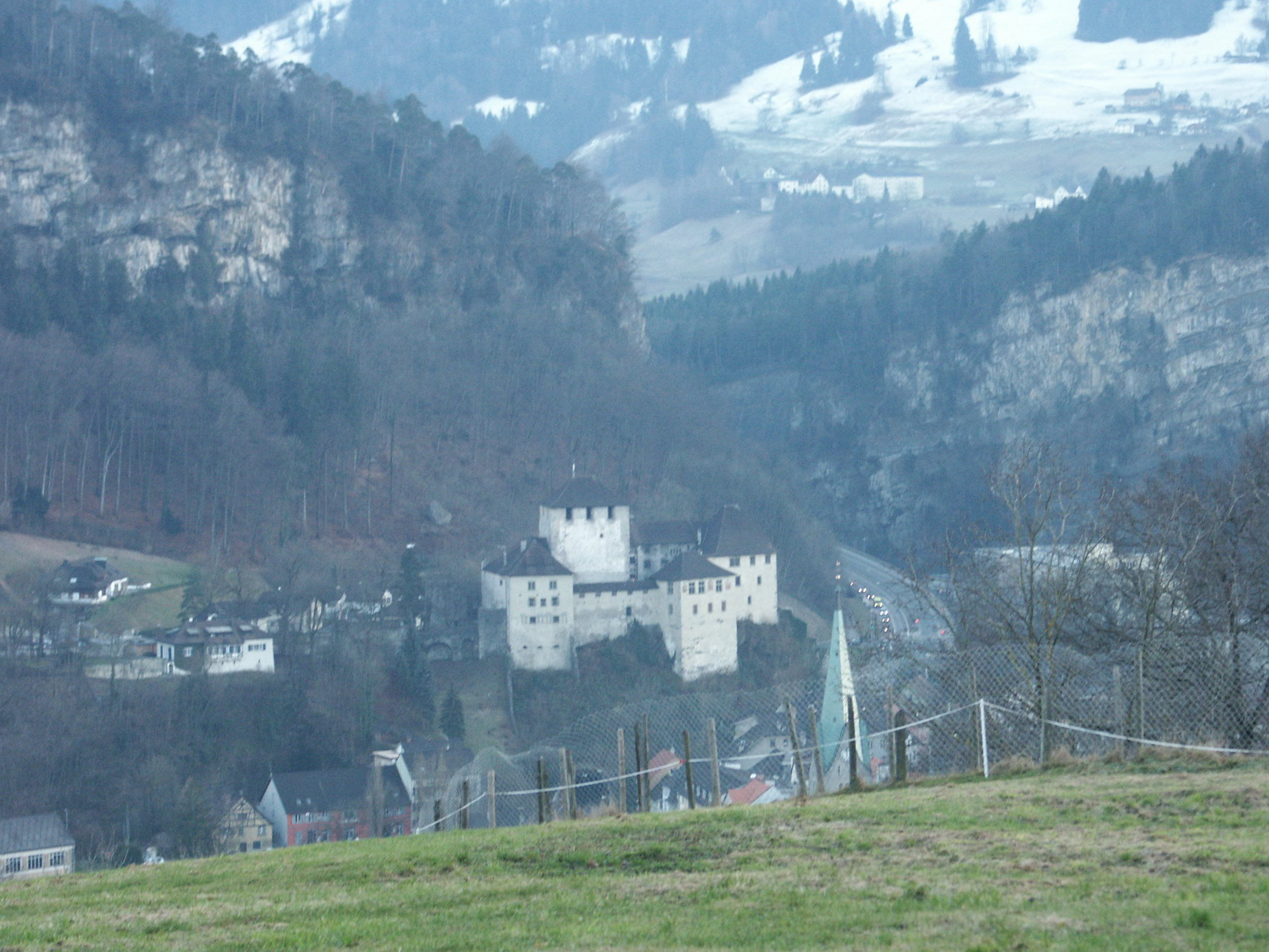 feldkirch - schattenburg